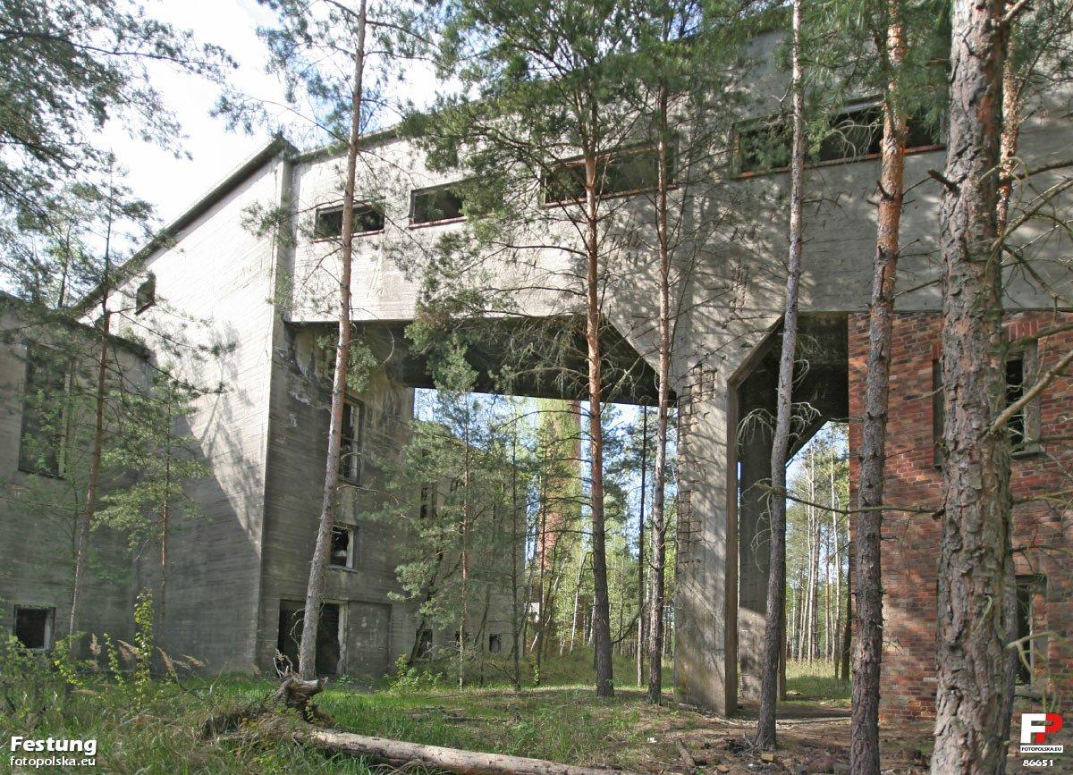 Zbliżenie na przenośnik węgla, który transportowano z wyładowywanych tu węglarek do potężnych zasobników, zwanych niekiedy bunkrami.